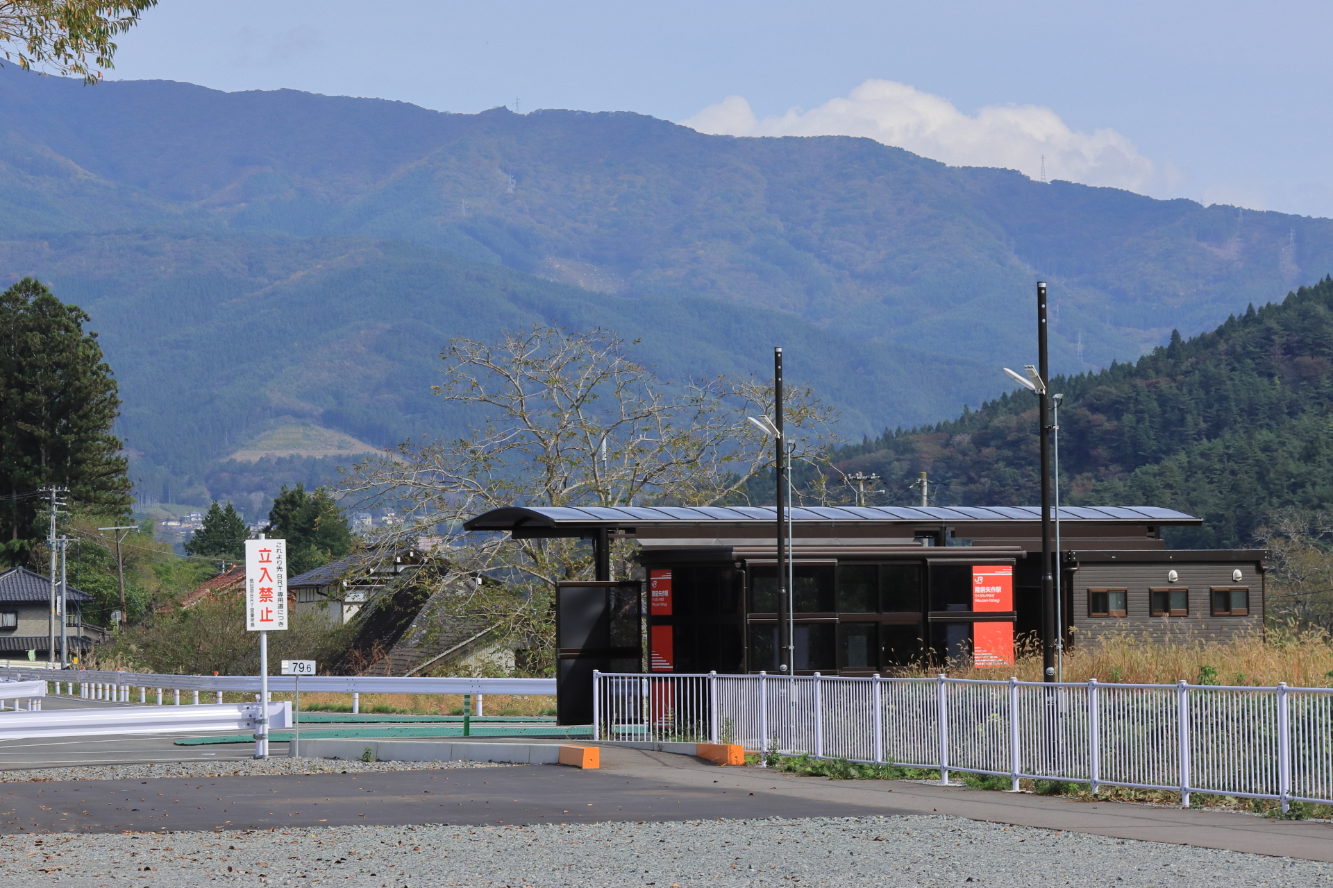 JR大船渡線BRTの陸前矢作駅。BRTとしては陸前高田方面からの終着駅であり、バス転回場に乗降場が設けられている。